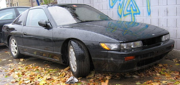 "Nissan" Sileighty